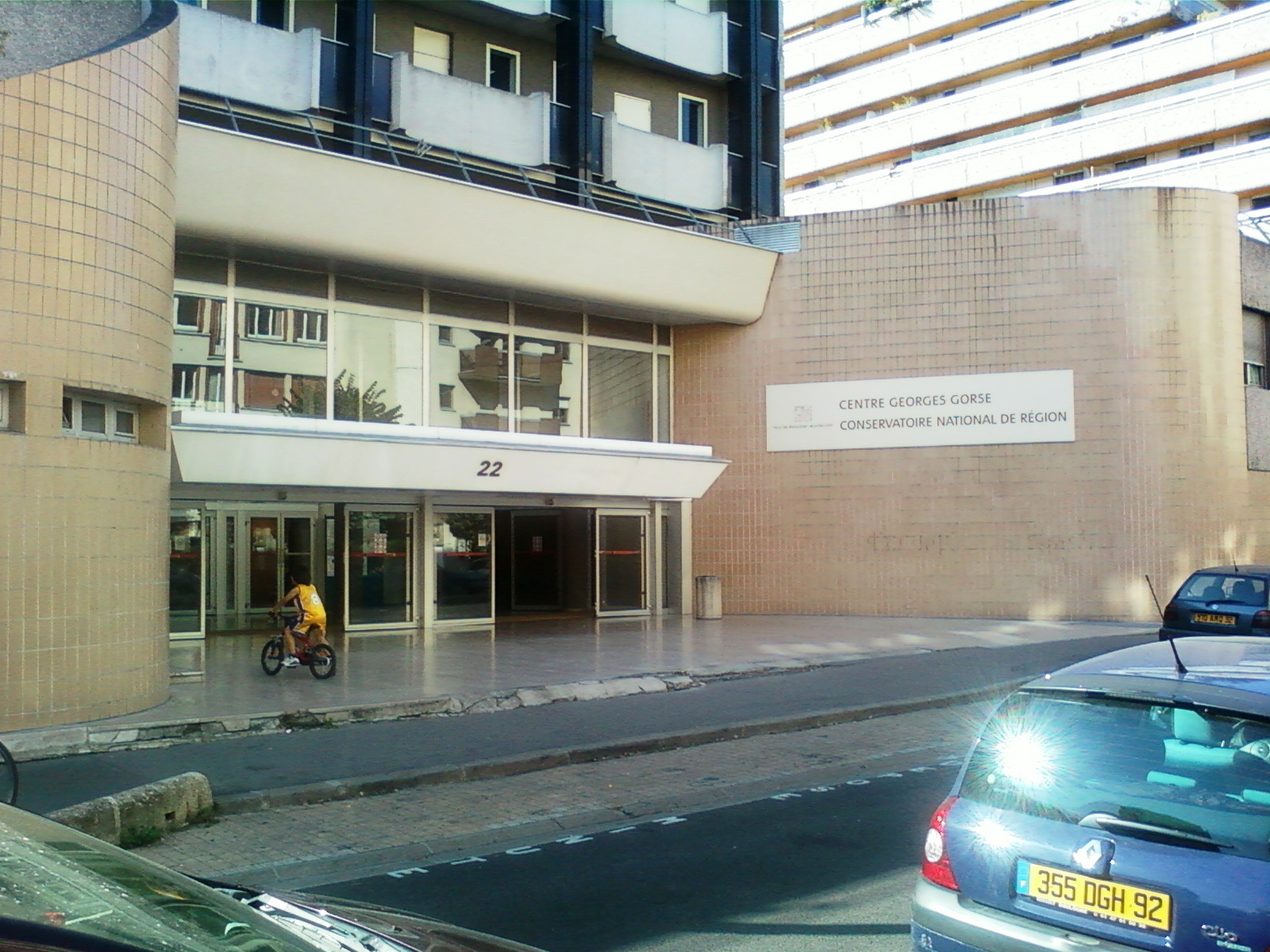 Entrée du Conservatoire à rayonnement régional de Boulogne-Billancourt (centre Georges Corse)